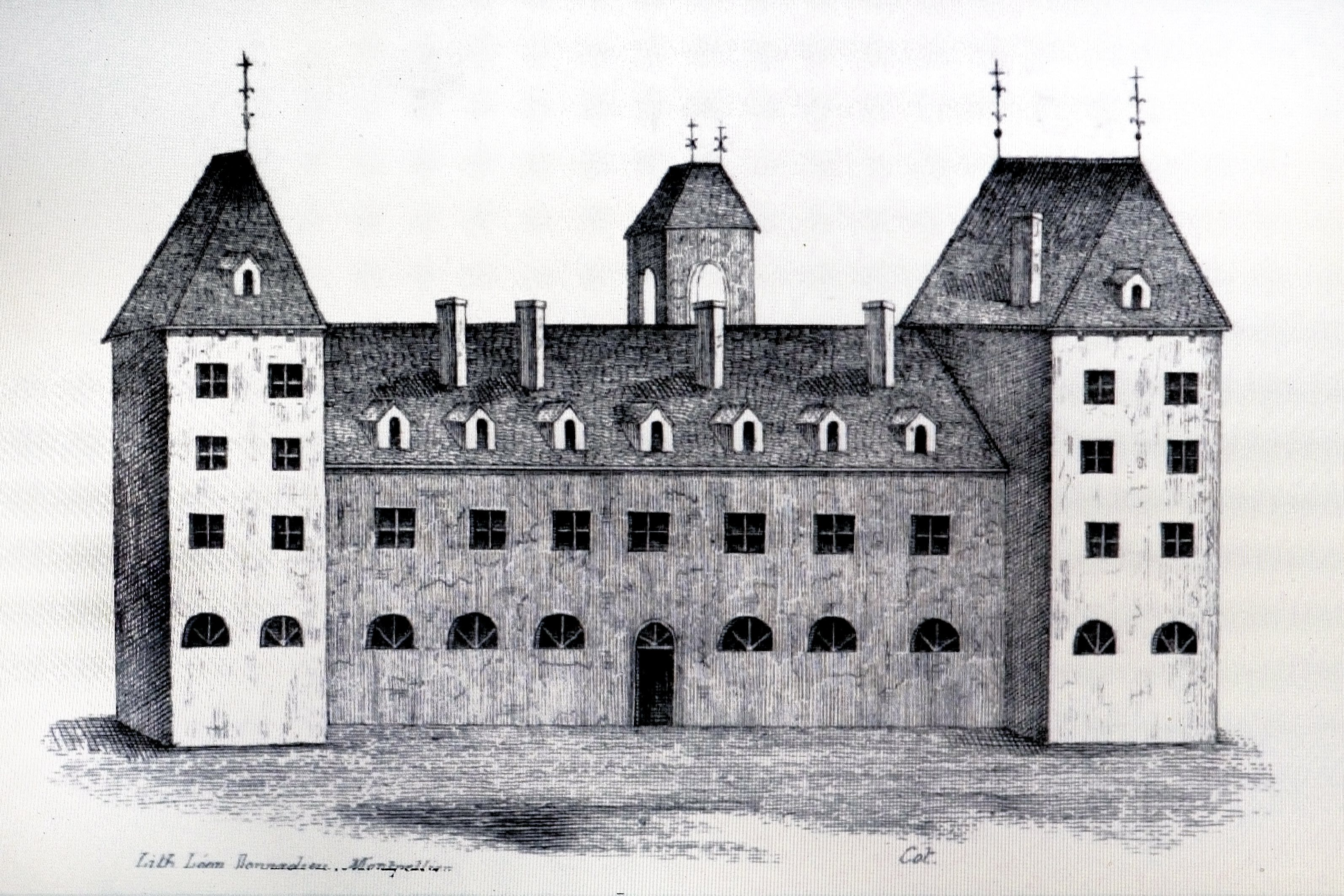 Vue méridionale de l'hôpital d'Aubrac avant la Révolution française, Dans Abbé Bousquet, L'ancien hôpital d'Aubrac, Montpellier, Martel aîné, 1841